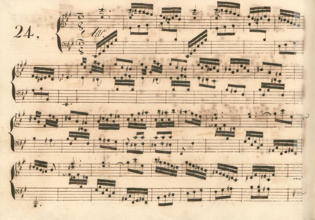 La sonate K. 381, telle qu'elle se présente dans le manuscrit de Venise, volume III no. 24.